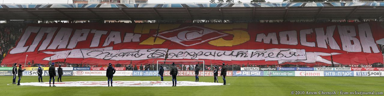 Перфоманс в честь 75-летия общества "Спартак" в Раменском. 2010 год